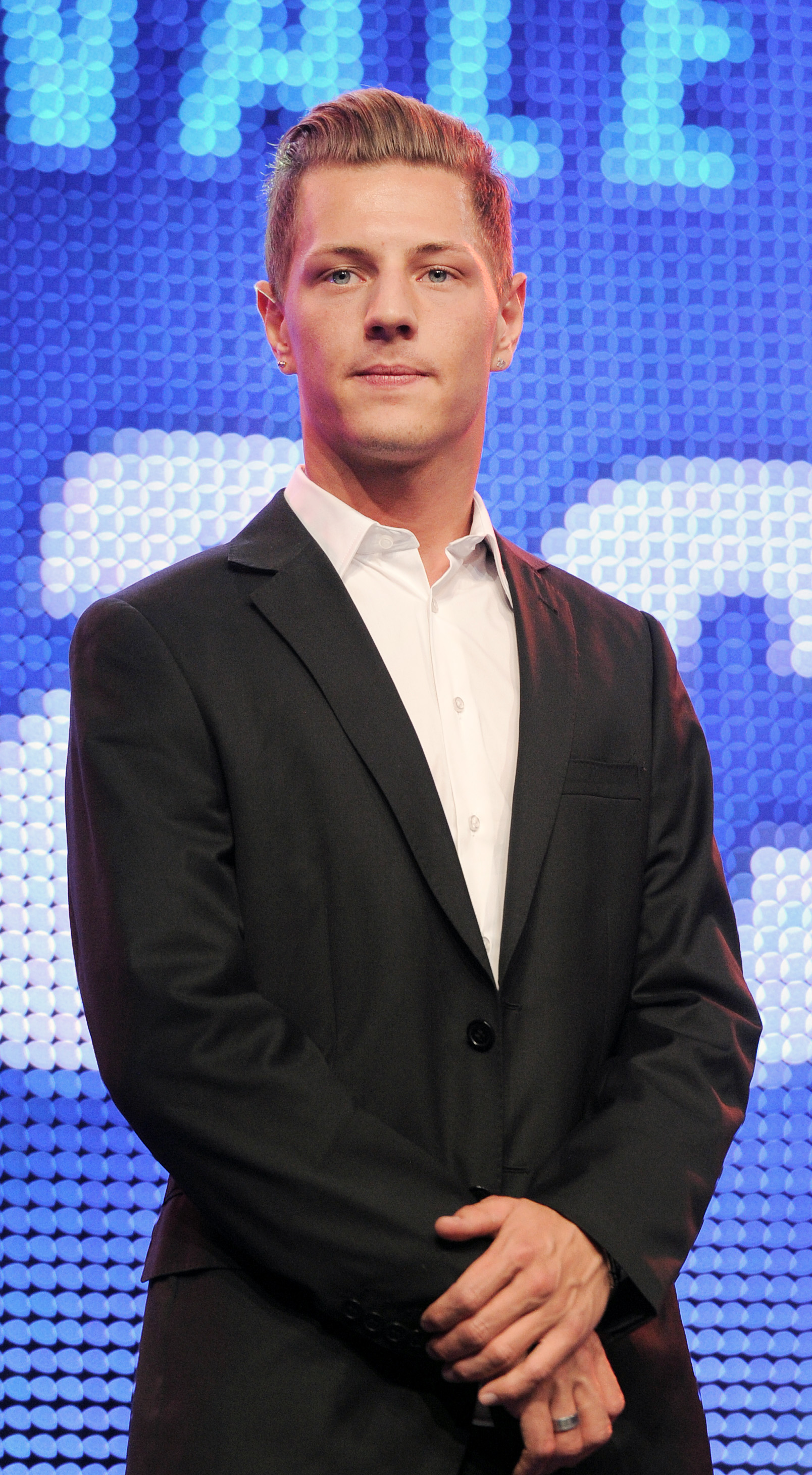 Davos, 03.10.2014. Sport, 12. Internationale Sportnacht Davos 2014. Der Motorradfahrer Dominique Aegerter.. Copyright by: foto-net / Kurt Schorrer